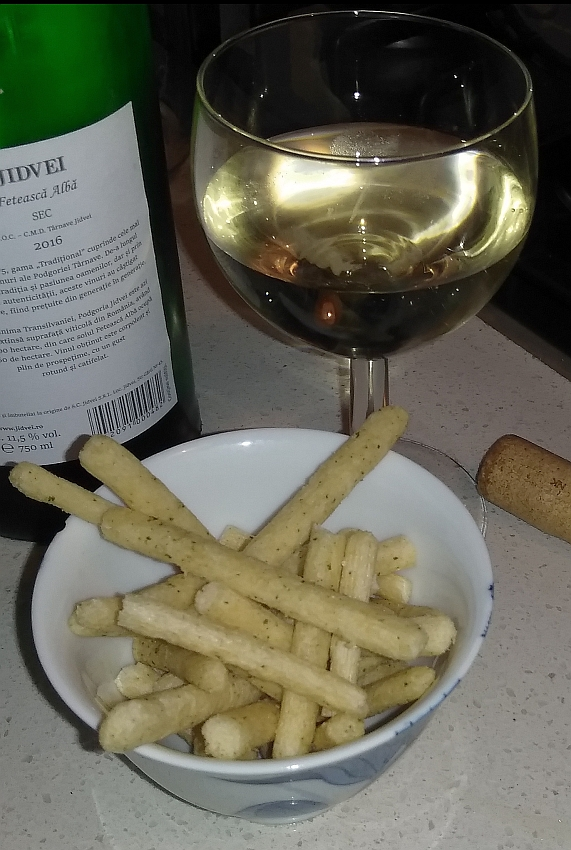 Un bicchiere di fetească albă DOC annata 2016